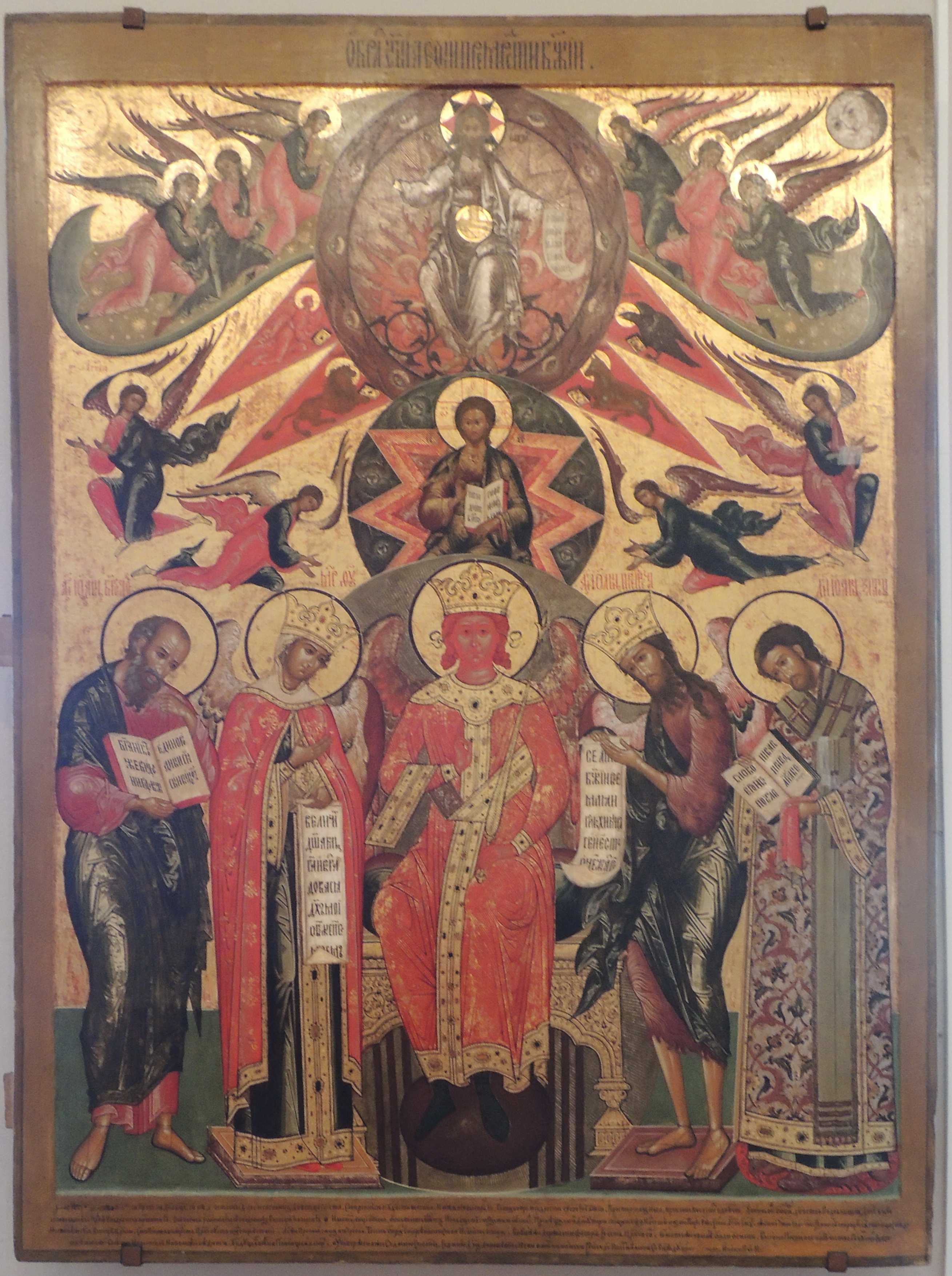 София Премудрость Божия Дерево, темпера. Ярославский музей-заповедник Середина XVII в. 180 × 131.4 см Инв. ЯМЗ 41526, ИК 405